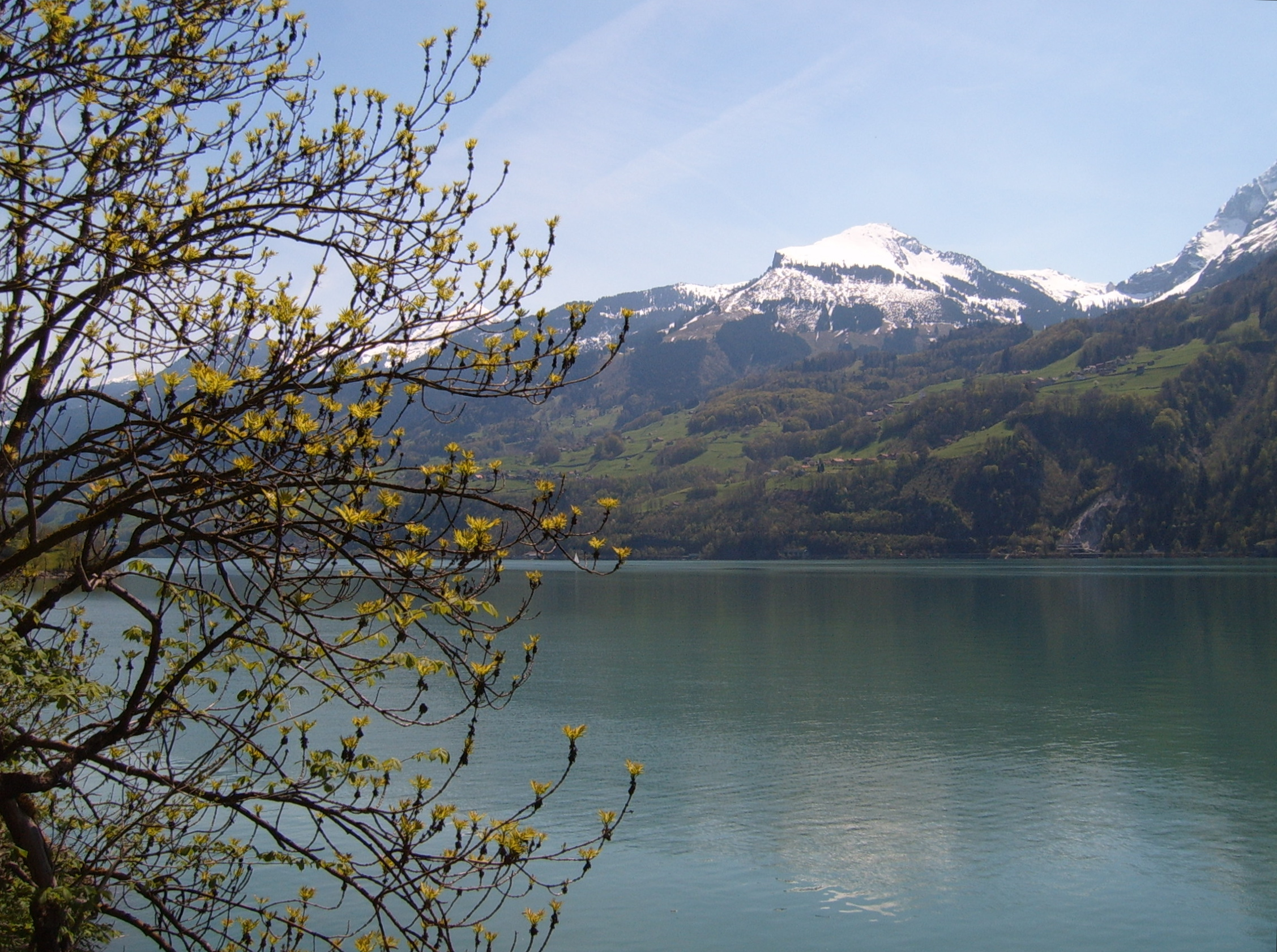 Walensee (Lake Walen, Switzerland)